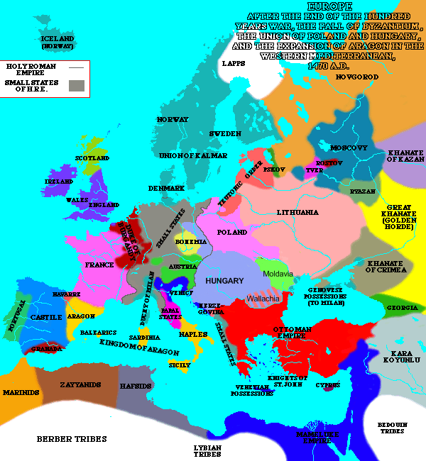 Europe in 1470